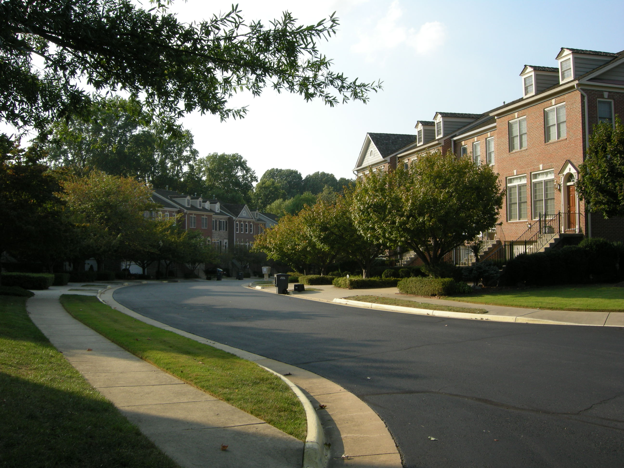 Oakton, va